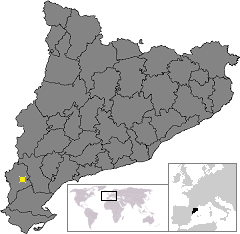 Localització de Gandesa. Location of Gandesa in Catalonia.